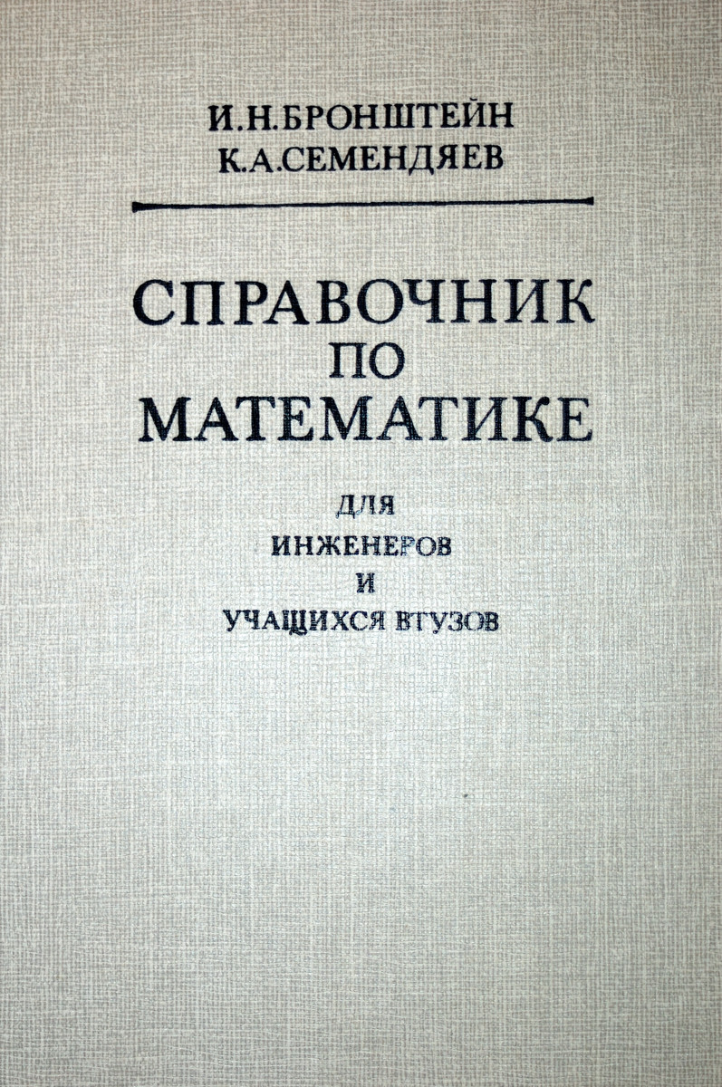 И.Н. Бронштейн, К.А. Семендяев, Справочник по математике, Наука, 13. ed., 1986